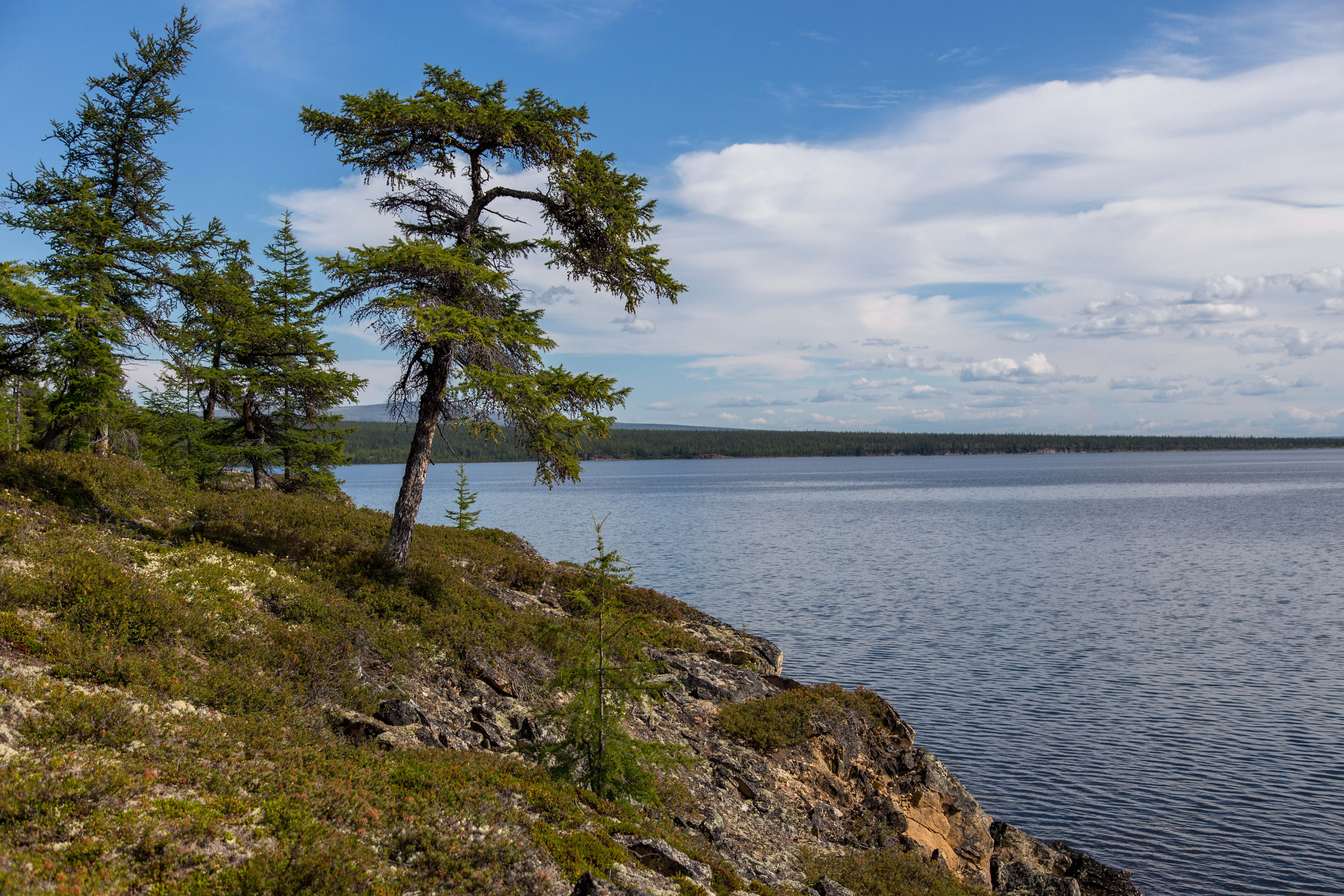 Озеро Ожогино: Расположен в административных границах Абыйского и Аллаиховского улусов, находится на левобережье реки Индигирка, Абыйский район, Якутия (Саха) This image is related to the protected area of Russia number 1410011